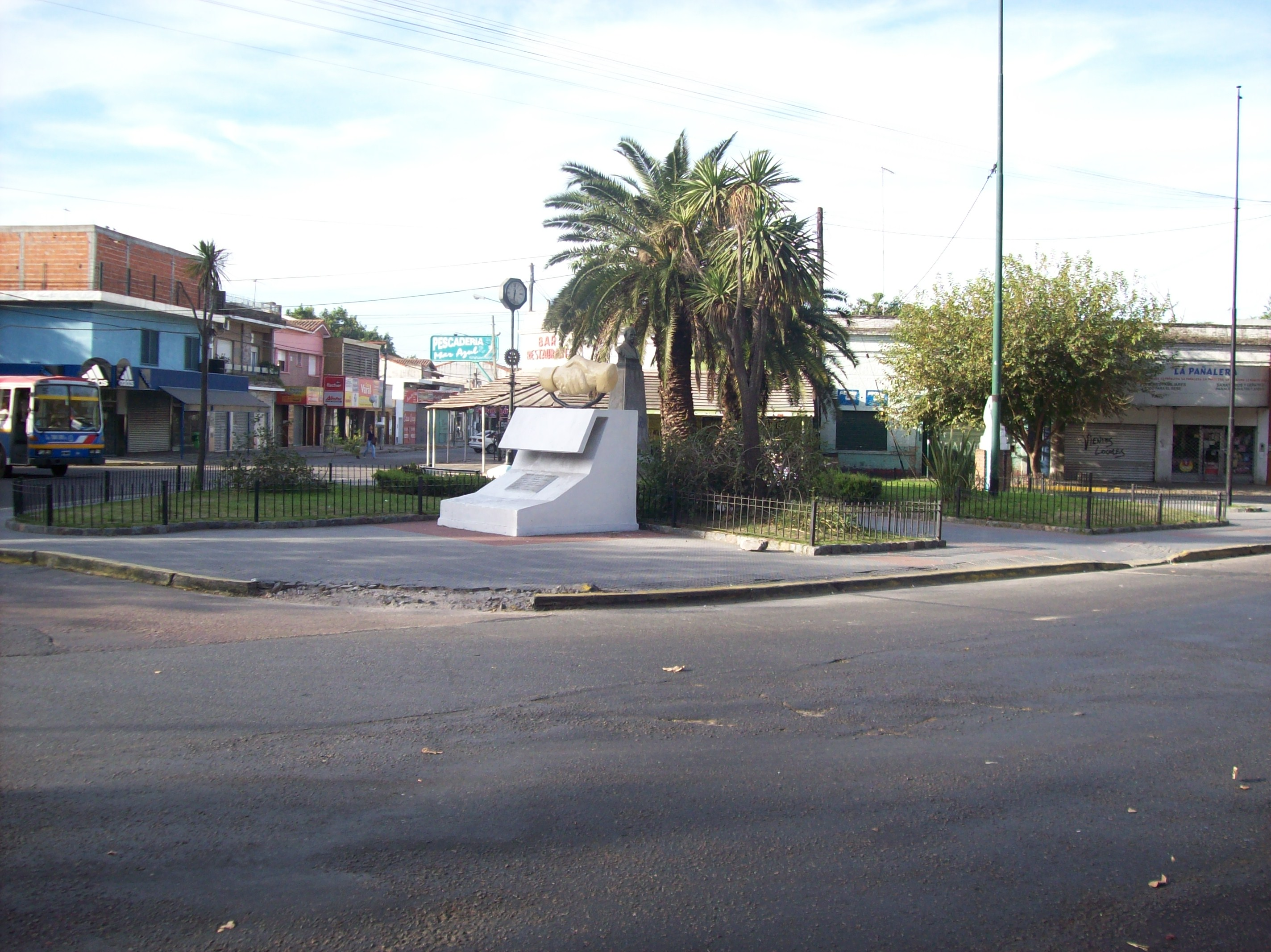 Plazoleta de la Amistad frente a la estación del Ferrocarril Roca de Rafael Calzada, partido de Almirante Brown, provincia de Buenos Aires, Argentina.